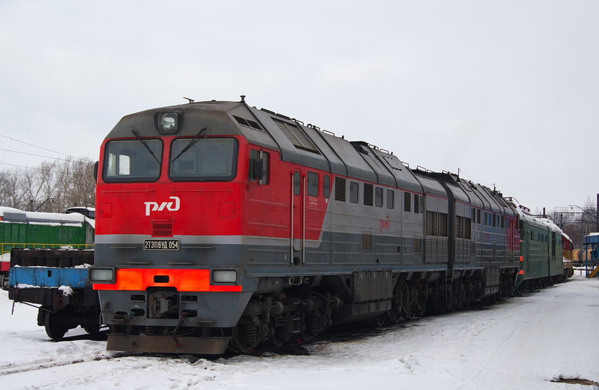 С завода поступил в депо Иваново